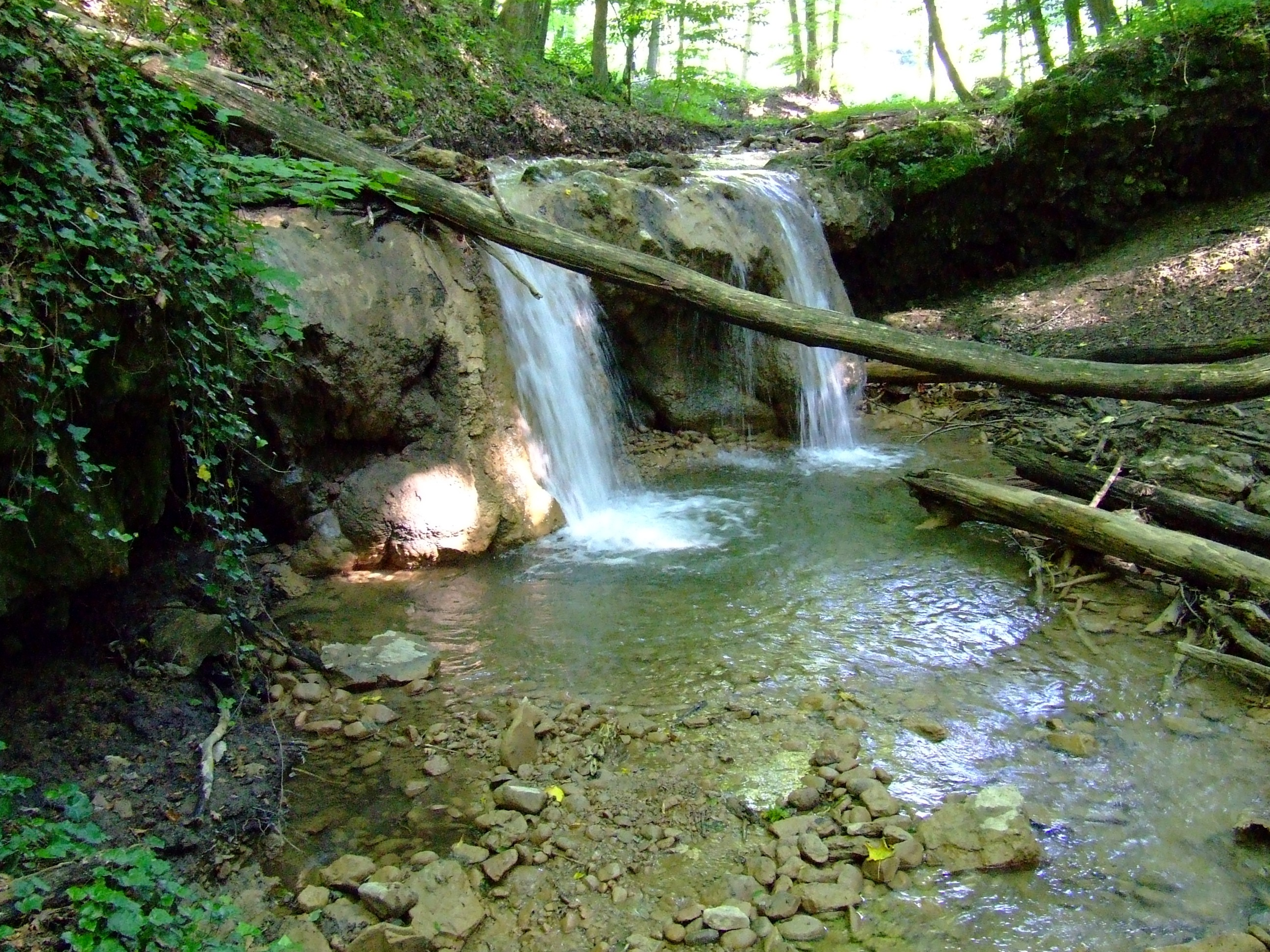 Az Ágnes-vízesés a Petnyák-völgyben (Mecsek, Melegmány-völgy Természetvédelmi Terület)